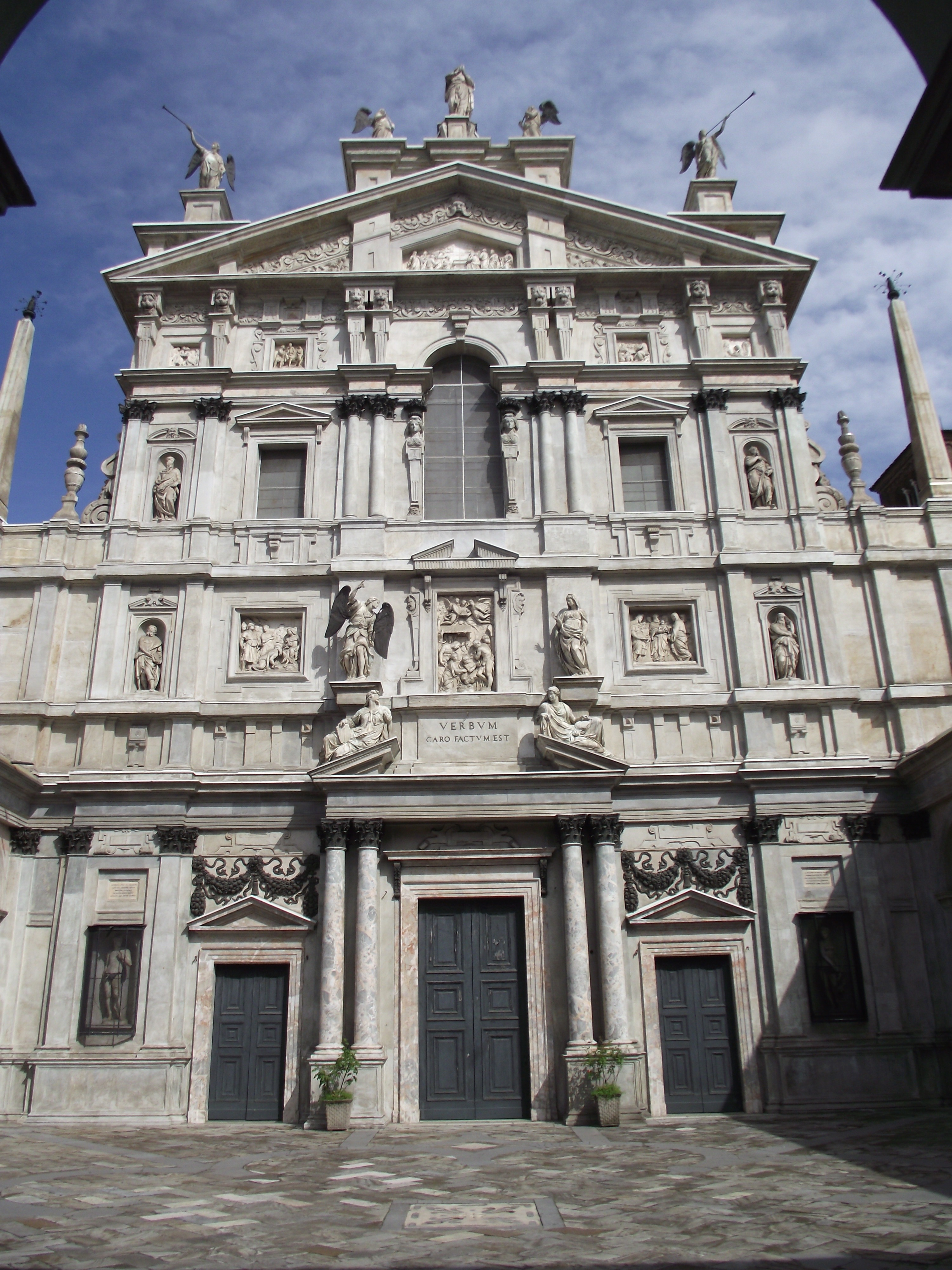 La facciata